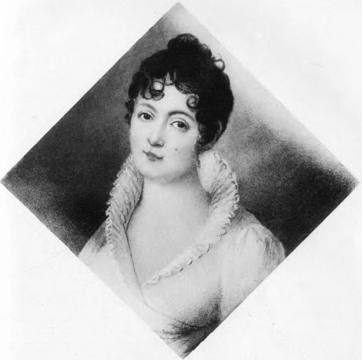 Marianna Morawska z Siemaszków